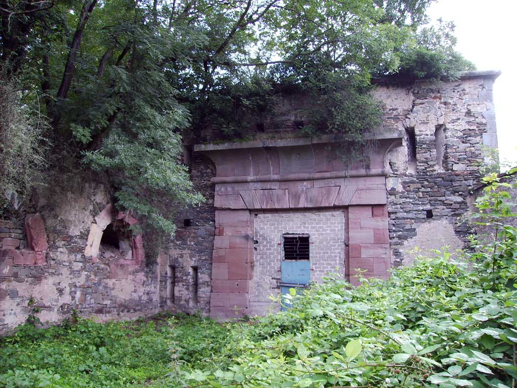 Werkeingang mit Poterne.